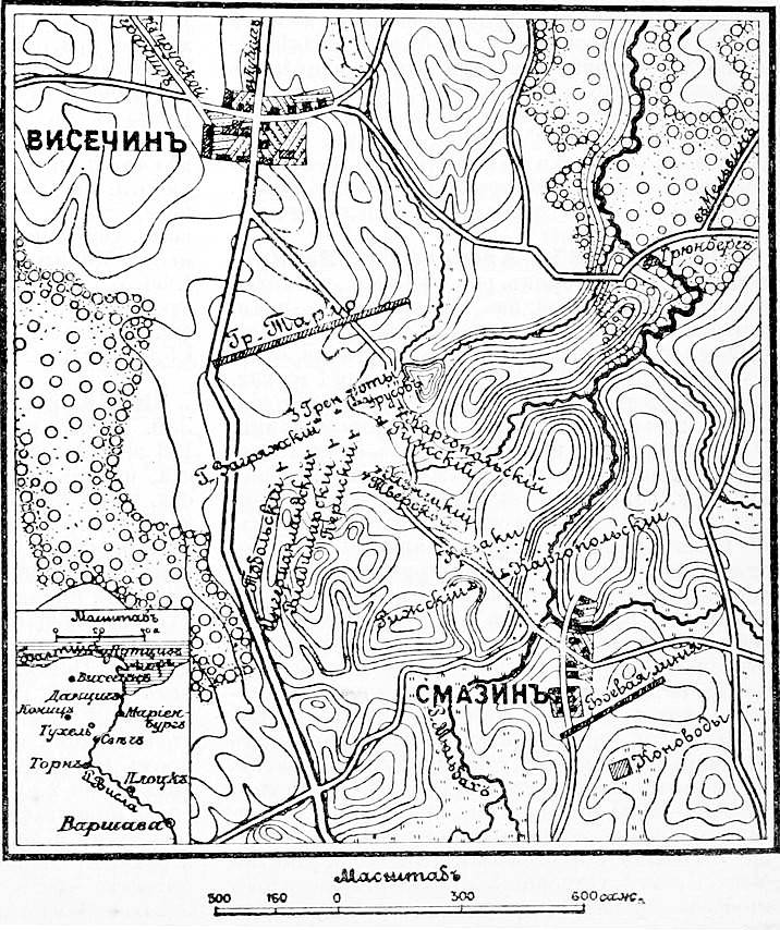 Данное изображение было использовано в статье «Висечин» опубликованной в шестом томе «Военной энциклопедии», который был издан книгоиздательским товариществом Ивана Дмитриевича Сытина в 1912 году в столице Российской империи городе Санкт-Петербурге.